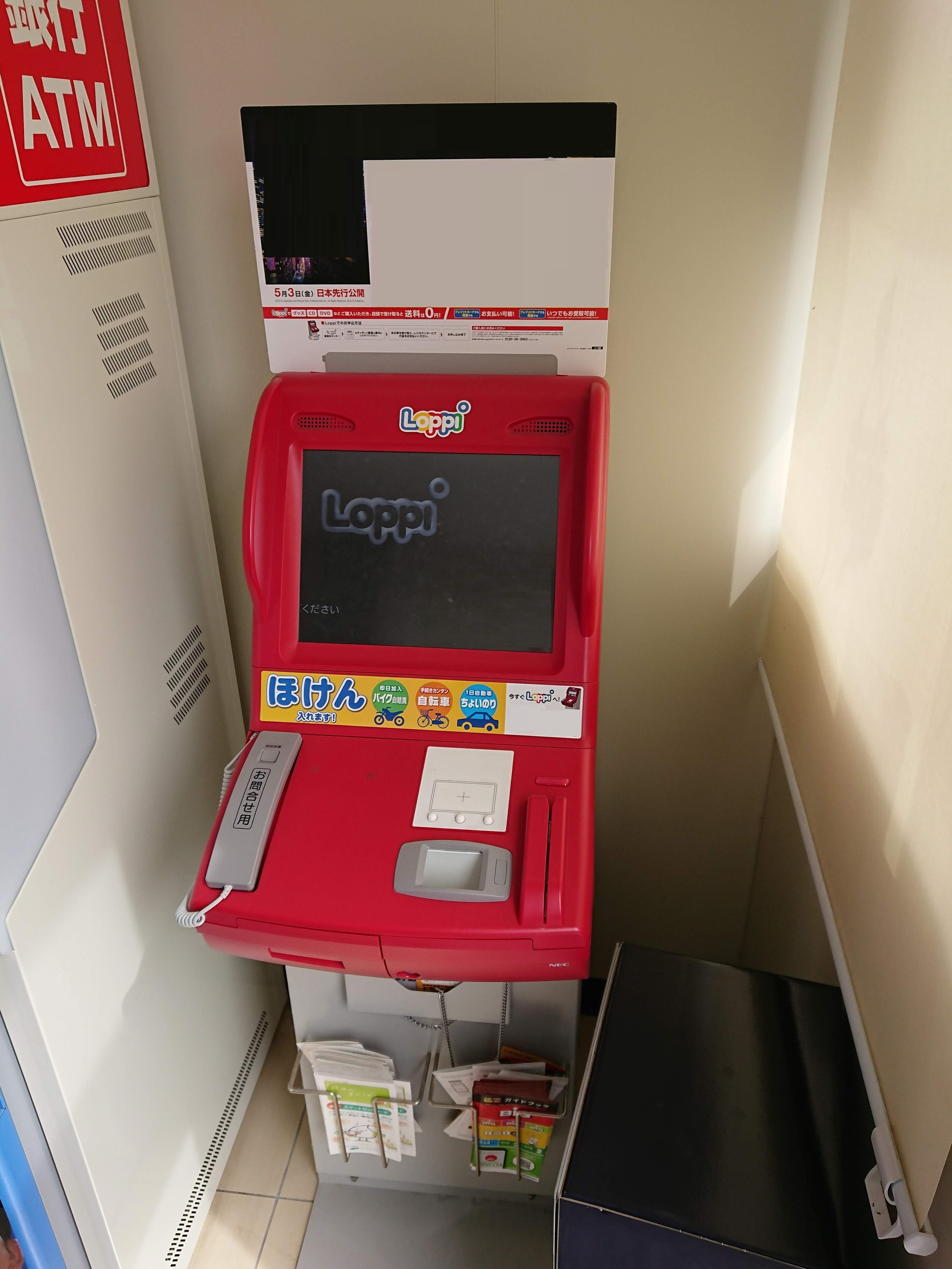 2019年現在ローソンに設置されているLoppiの端末。「ローソン・道の駅あらい店」（新潟県妙高市大字猪野山58-1）にて。